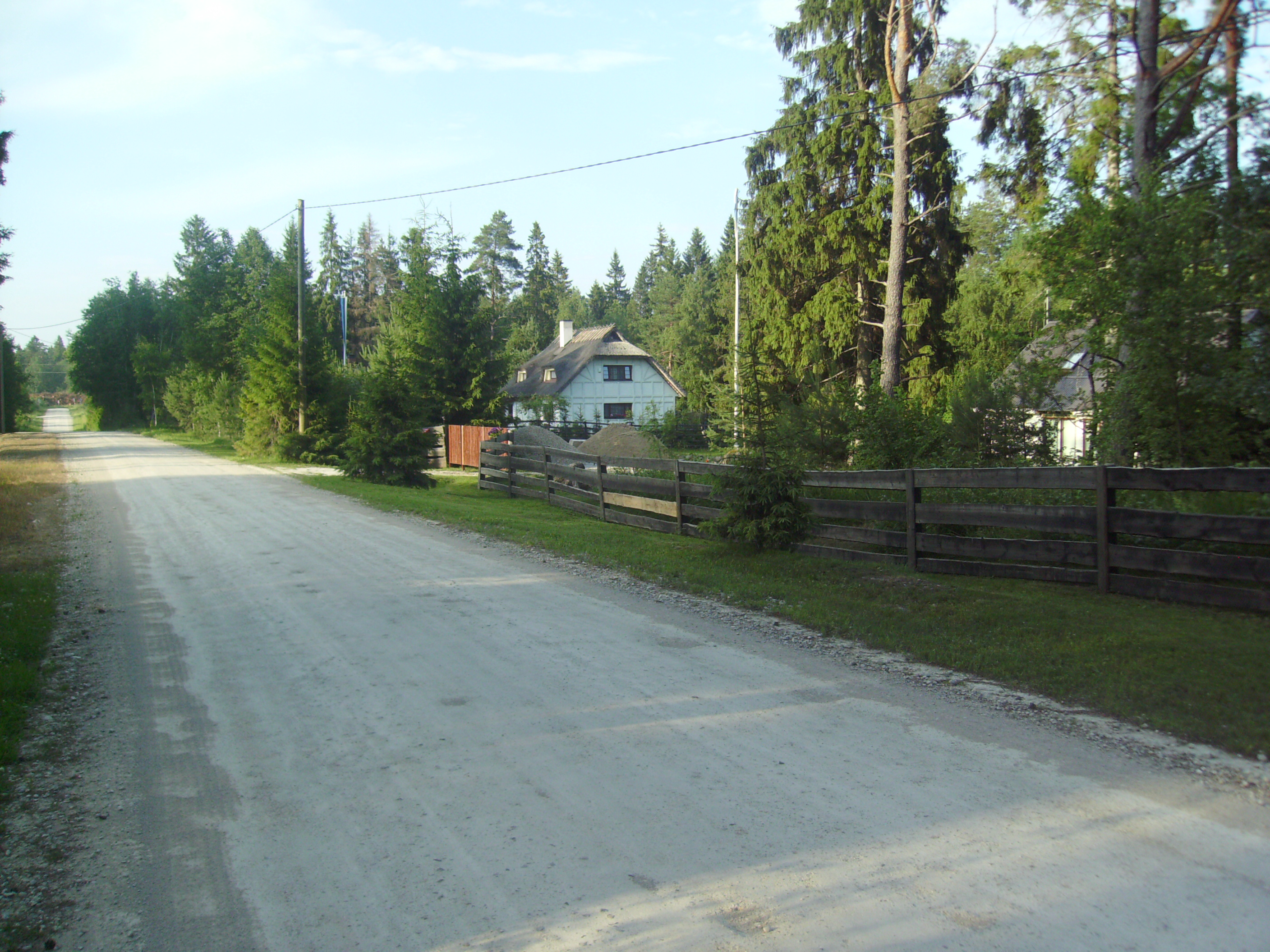 Vilivere.